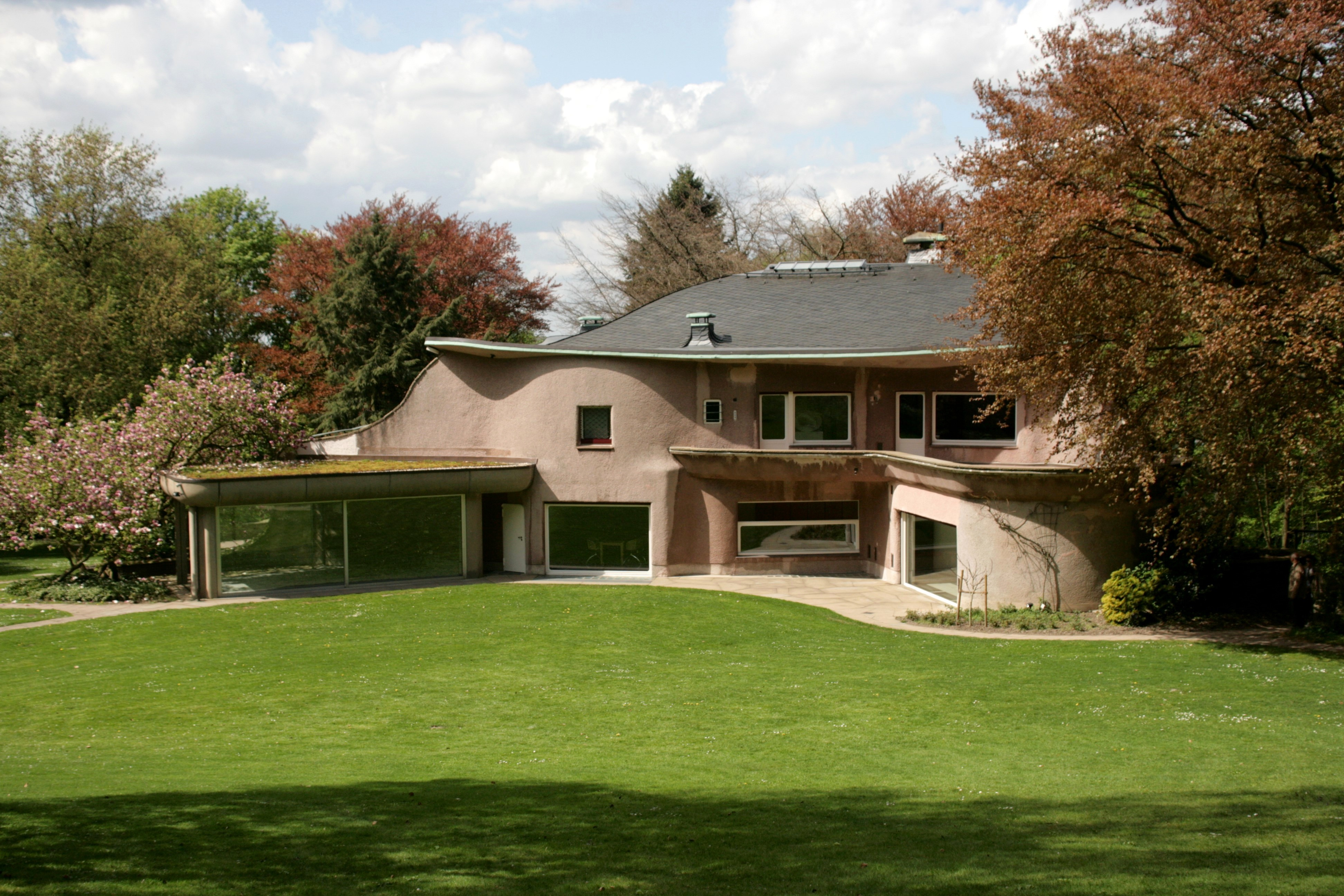 Villa Herberts, Hirschstraße in Wuppertal